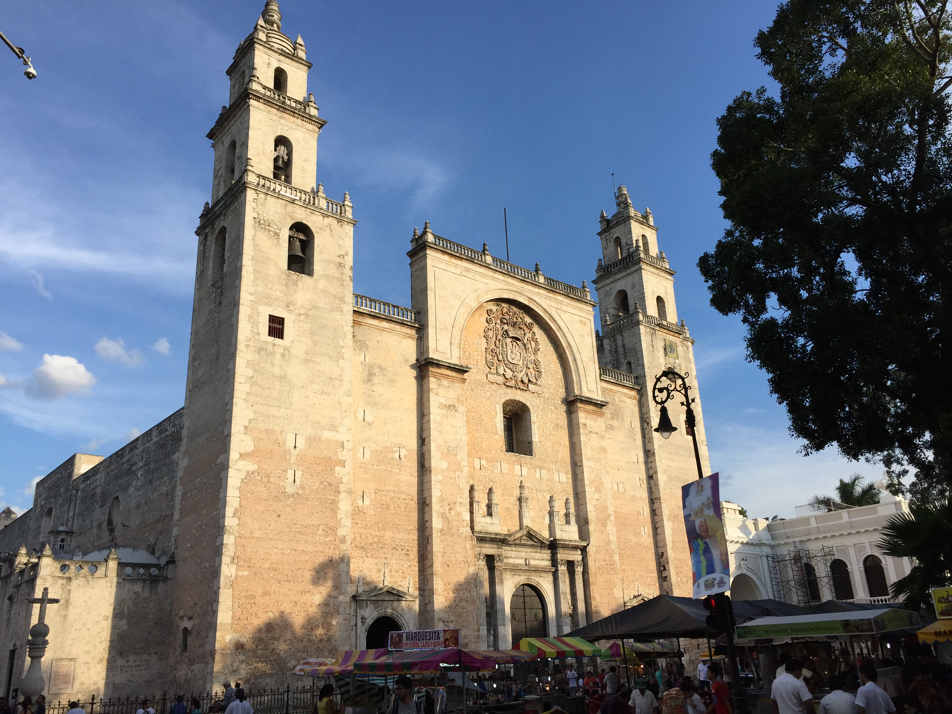 Mérida, Yucatán